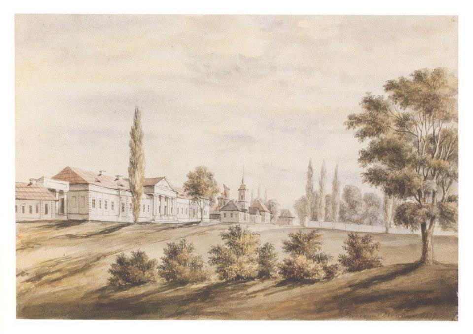 Беларуская (тарашкевіца): Дзярэчын (Dziarečyn), палац Сапегаў (Sapieha)